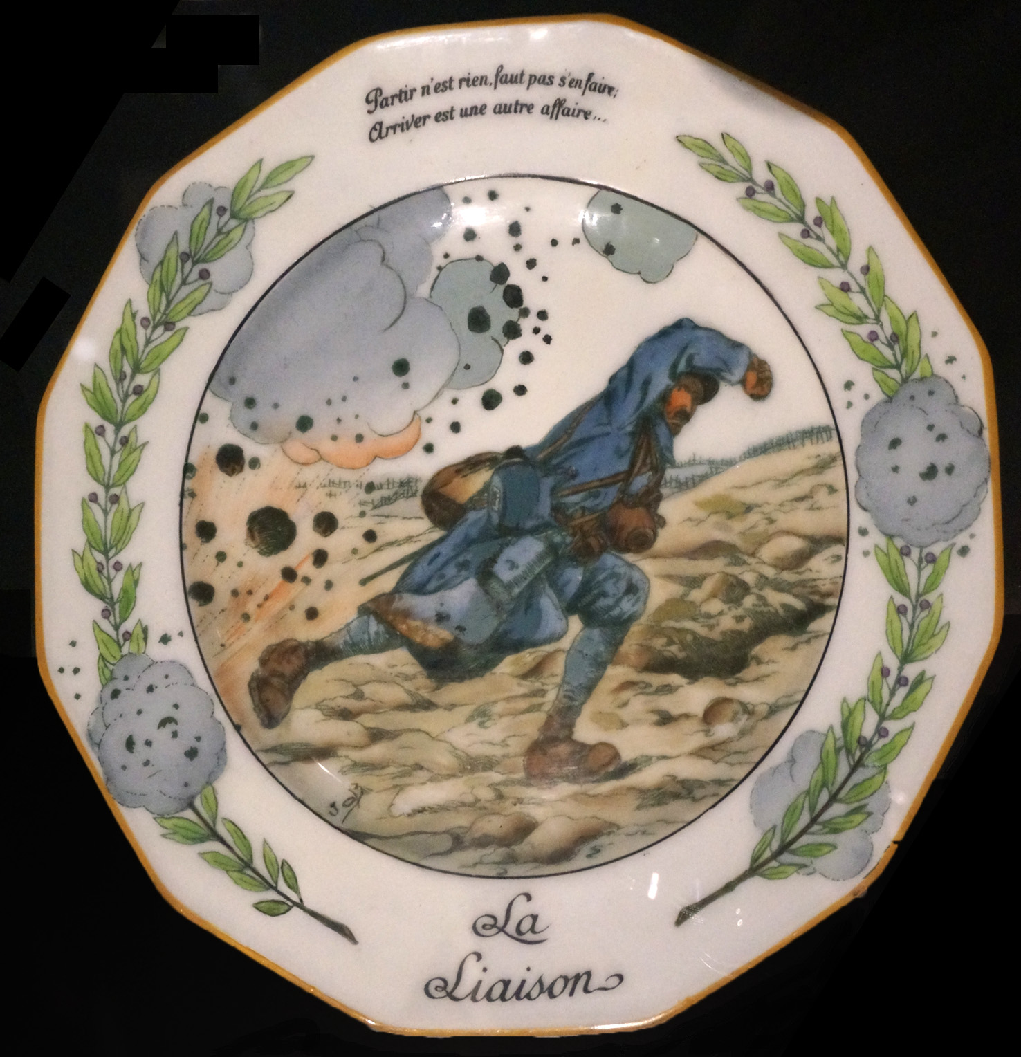 vue de la collection Faïence au Musée barrois.